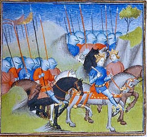 Lothar I. Franský a Ludvík Němec v bitvě u Fontenoy